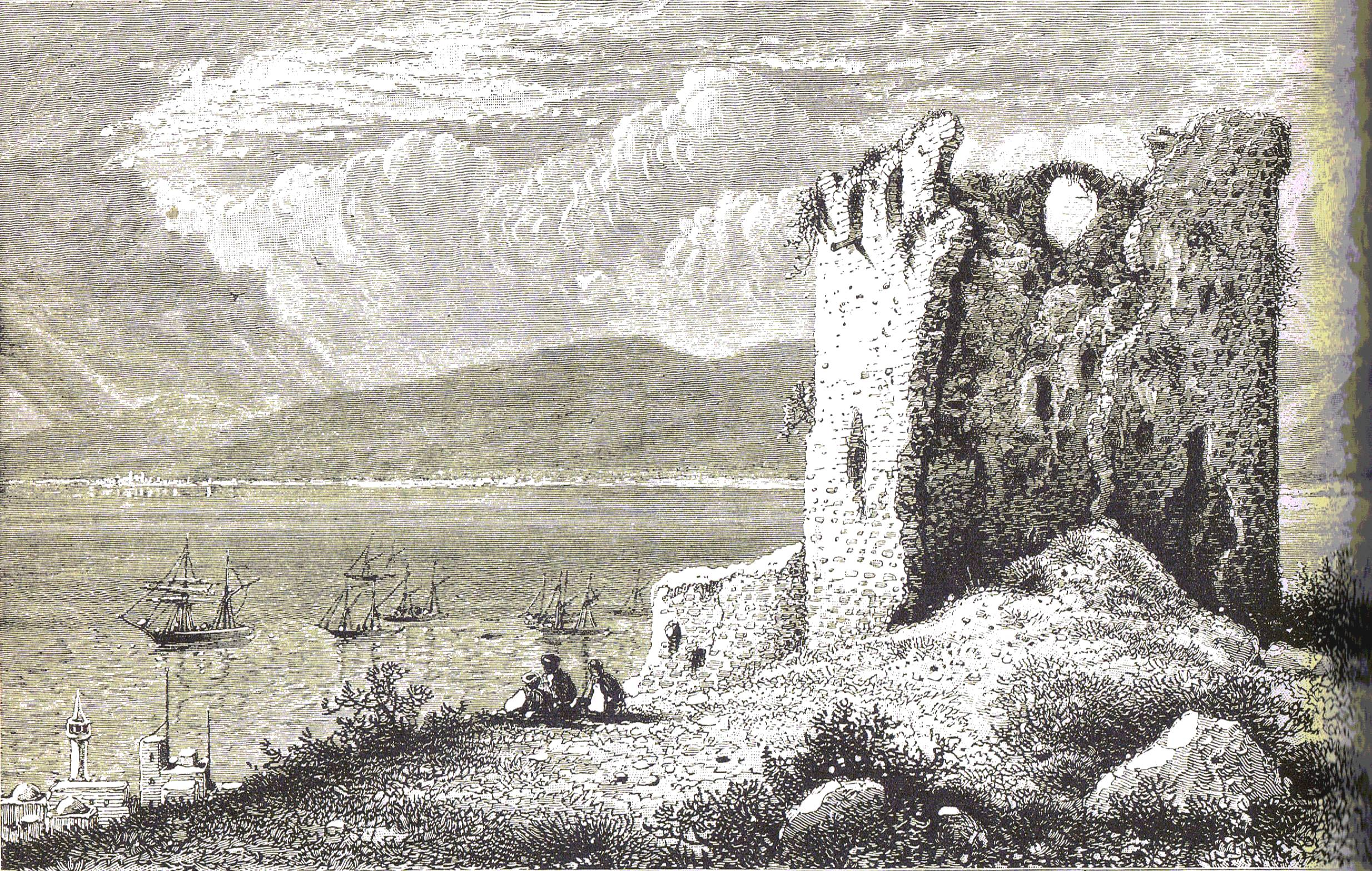 El Burj in Haifa, view to the bay from Mount Carmel, c.1880 בורג' א-סלאם במורד הכרמל, בחיפה, מבט אל מפרץ חיפה. מסִדרת "ארץ ישראל הציורית" (בעריכת צ'ארלס וילסון), כרך שלישי; ראה אור בלונדון ב-1881